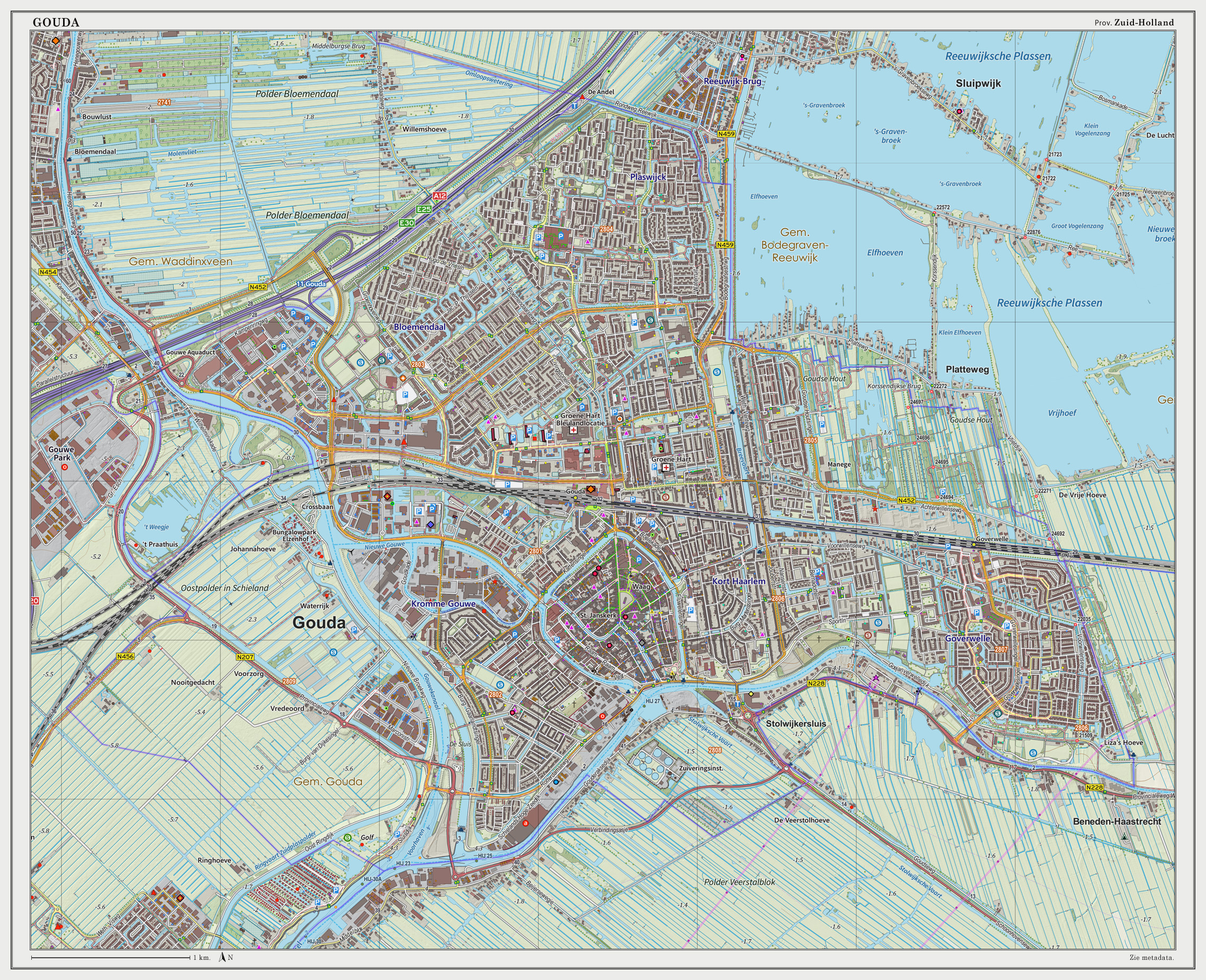 Topografische kaart van Gouda (woonplaats). Resolutie: 300 pixels/km. Kaartbeeld samengesteld uit de open geodata van de Top10NL en Top25namen (Basisregistratie Topografie, Kadaster), Creative Commons BY licentie. Gebouwvlakken uit open geodata BAG extract. Wegen uit de OpenStreetMap, OpenStreetMap community. Reliëfschaduw uit de Actuele Hoogtekaart AHN2. Samenstelling en kleurenschema: Jan-Willem van Aalst, met QGIS2. Zie ook de Legenda.